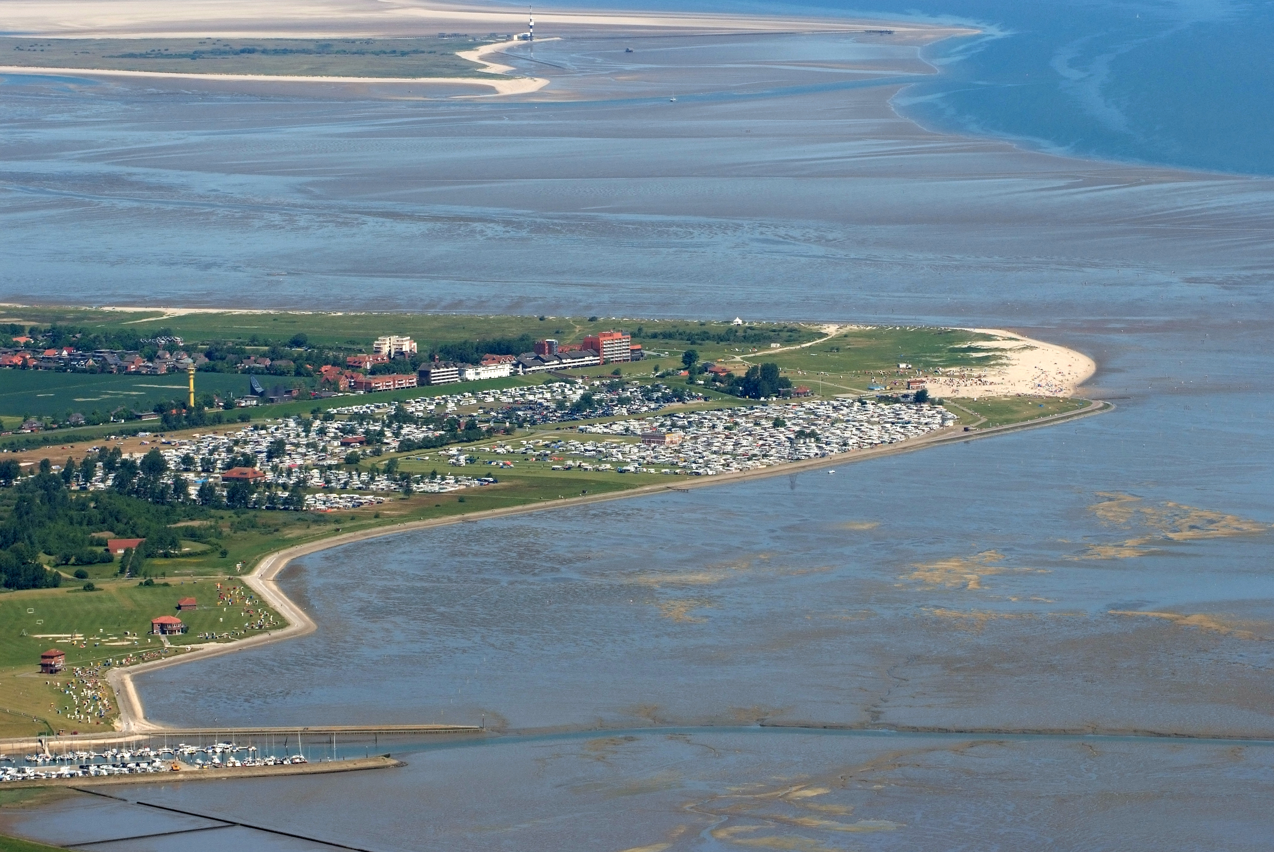 Schillig (Fotoflug vom Flugplatz Nordholz-Spieka über Cuxhaven und Wilhelmshaven)